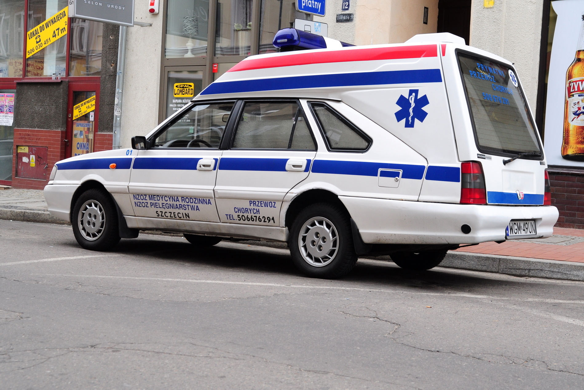 Polonez Ambulans 1,6 GLI ( Daewoo-FSO Cargo Plus ). Nadwozie adaptowane do funkcji sanitarki w Zakładzie Tapicerki Samochodowej w Grójcu.